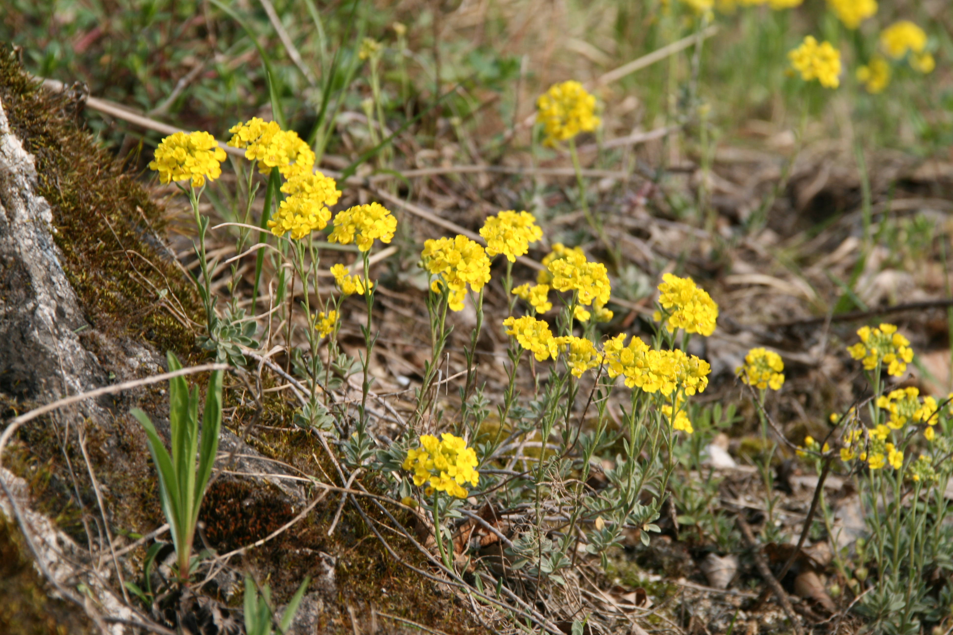 Žički grobeljnik (Alyssum montanum ssp. pluscanescens). Rastlina, ki v Sloveniji raste samo v vasi Žiče, v okolici kamnoloma.